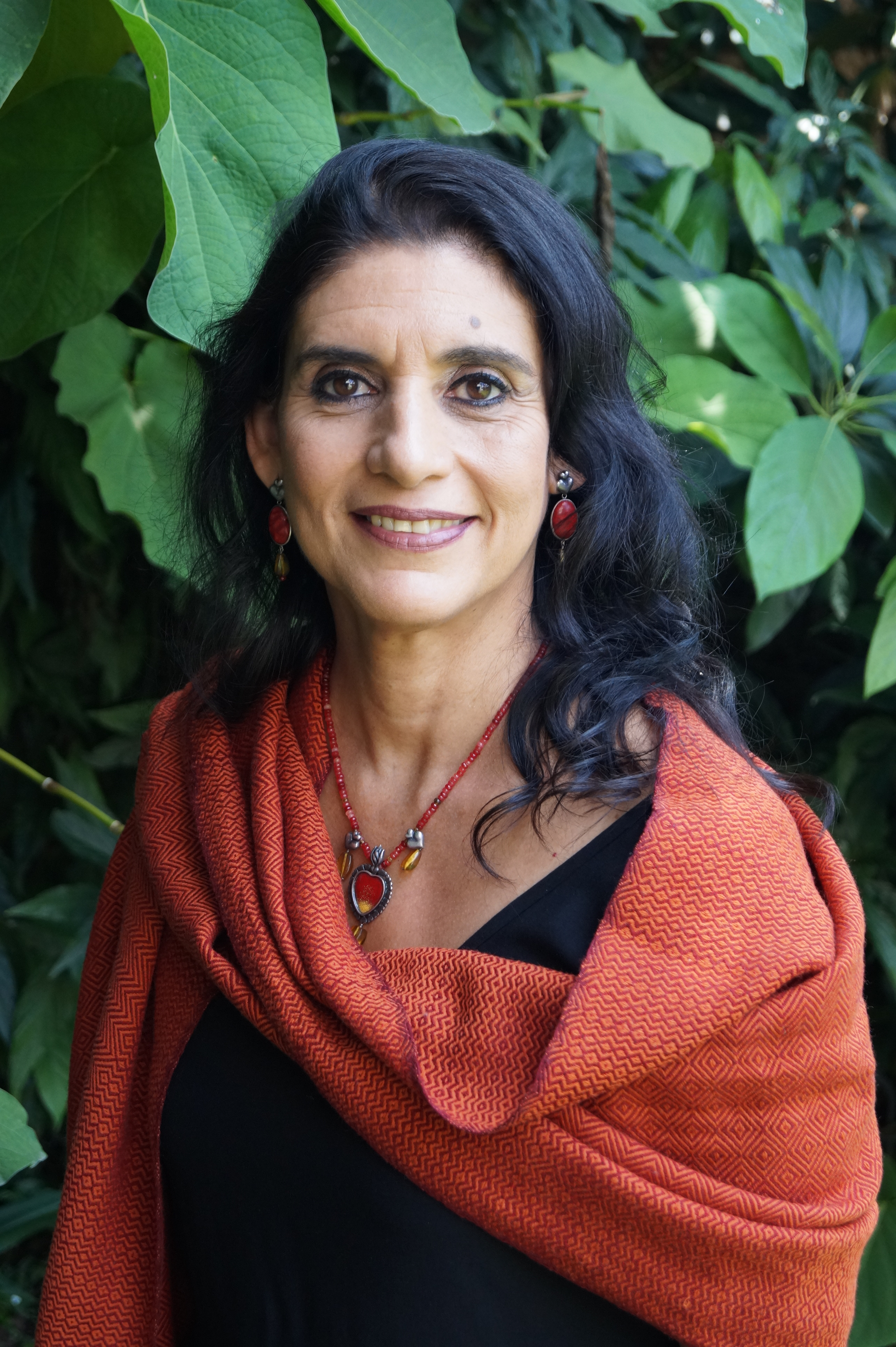 Rosalva Aída Hernández Castillo en 2017.